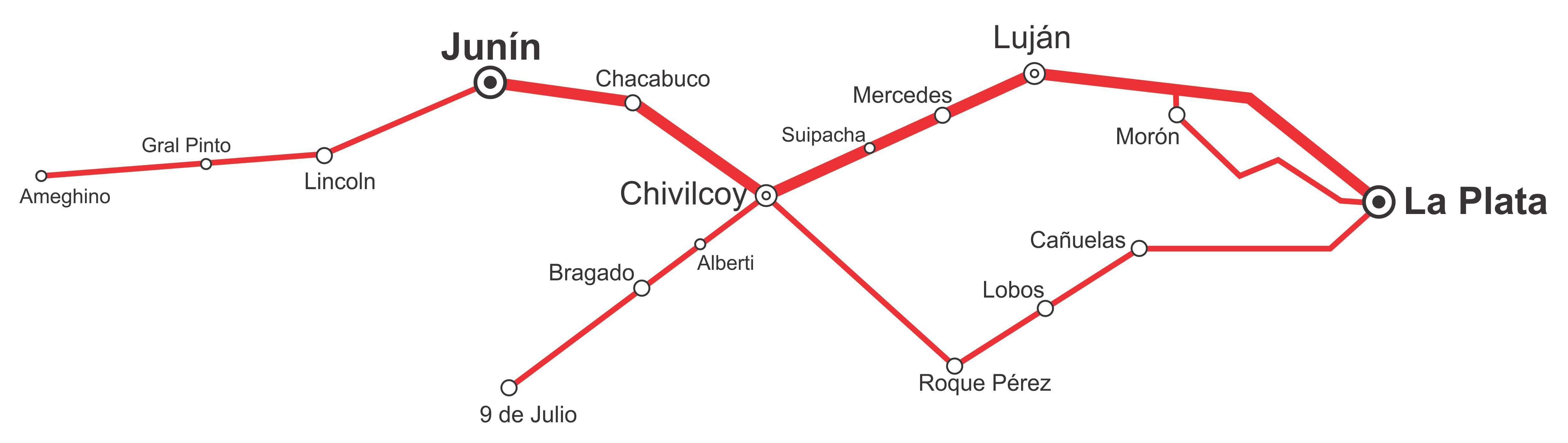 Esquema de recorridos de la empresa de ómnibus TALP